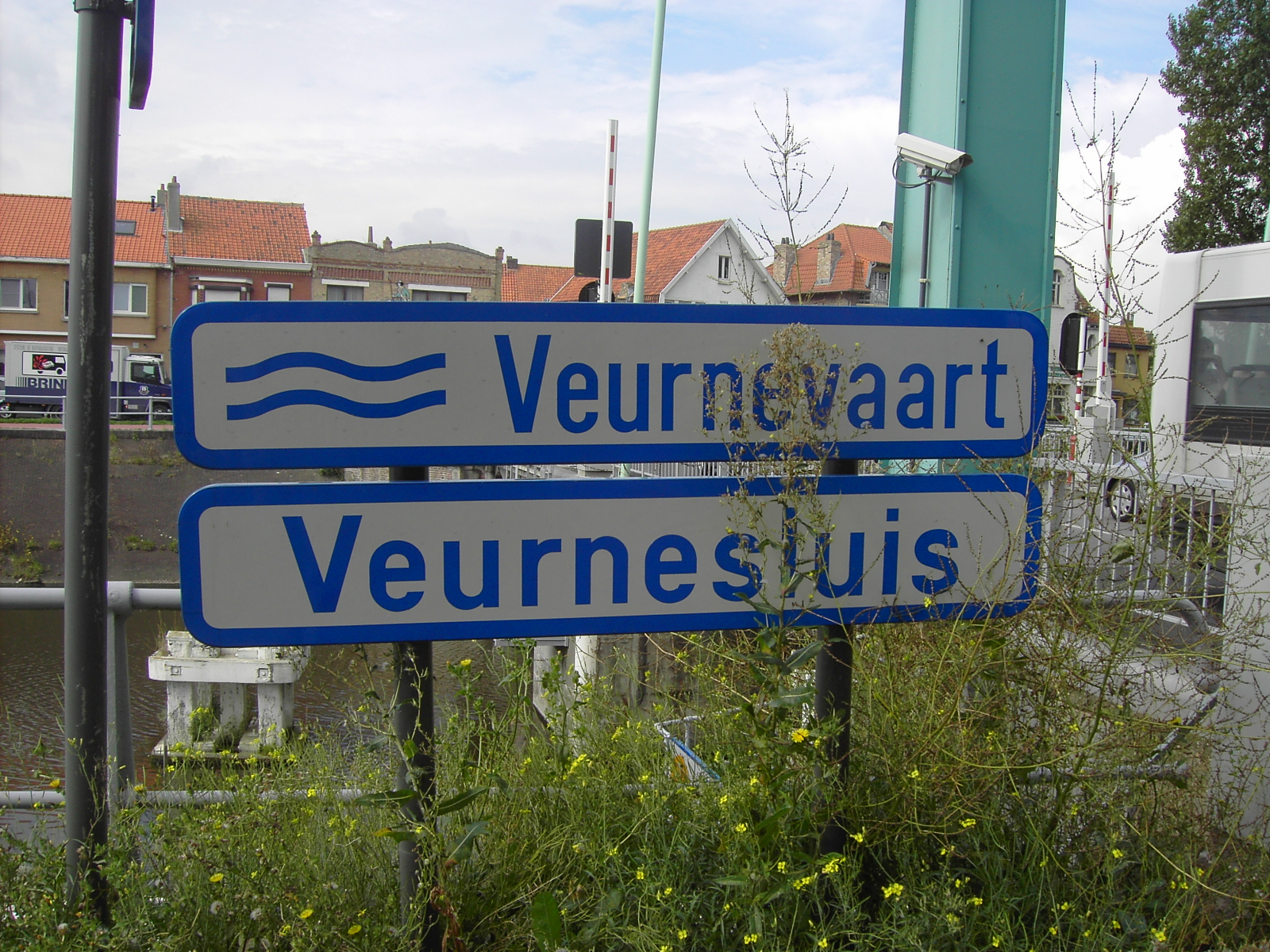 Naamplaten "Veurnevaart" en "Veurnesluis"